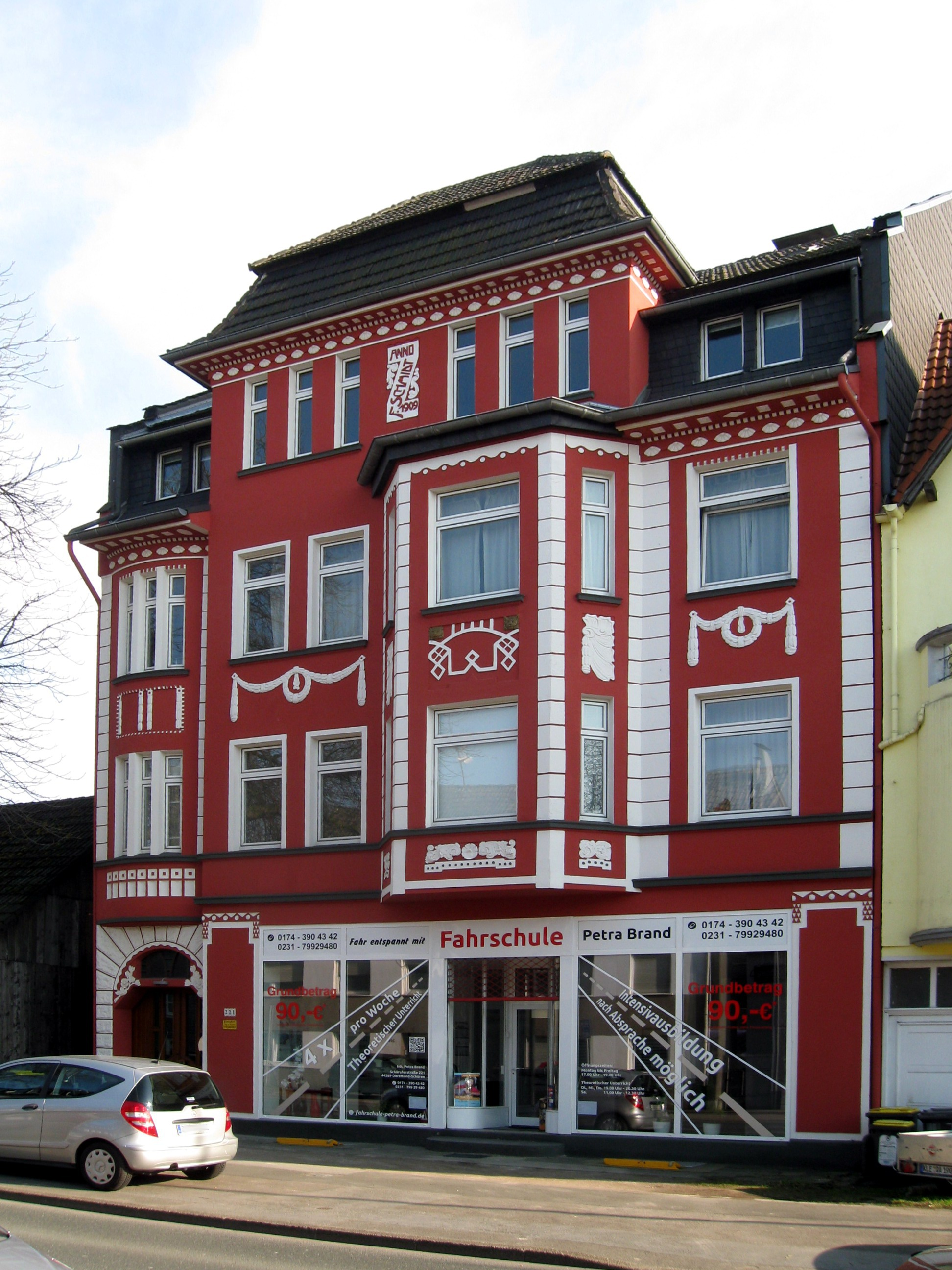 Stolpersteine in Dortmund, Schüruferstraße 221, Gebäude